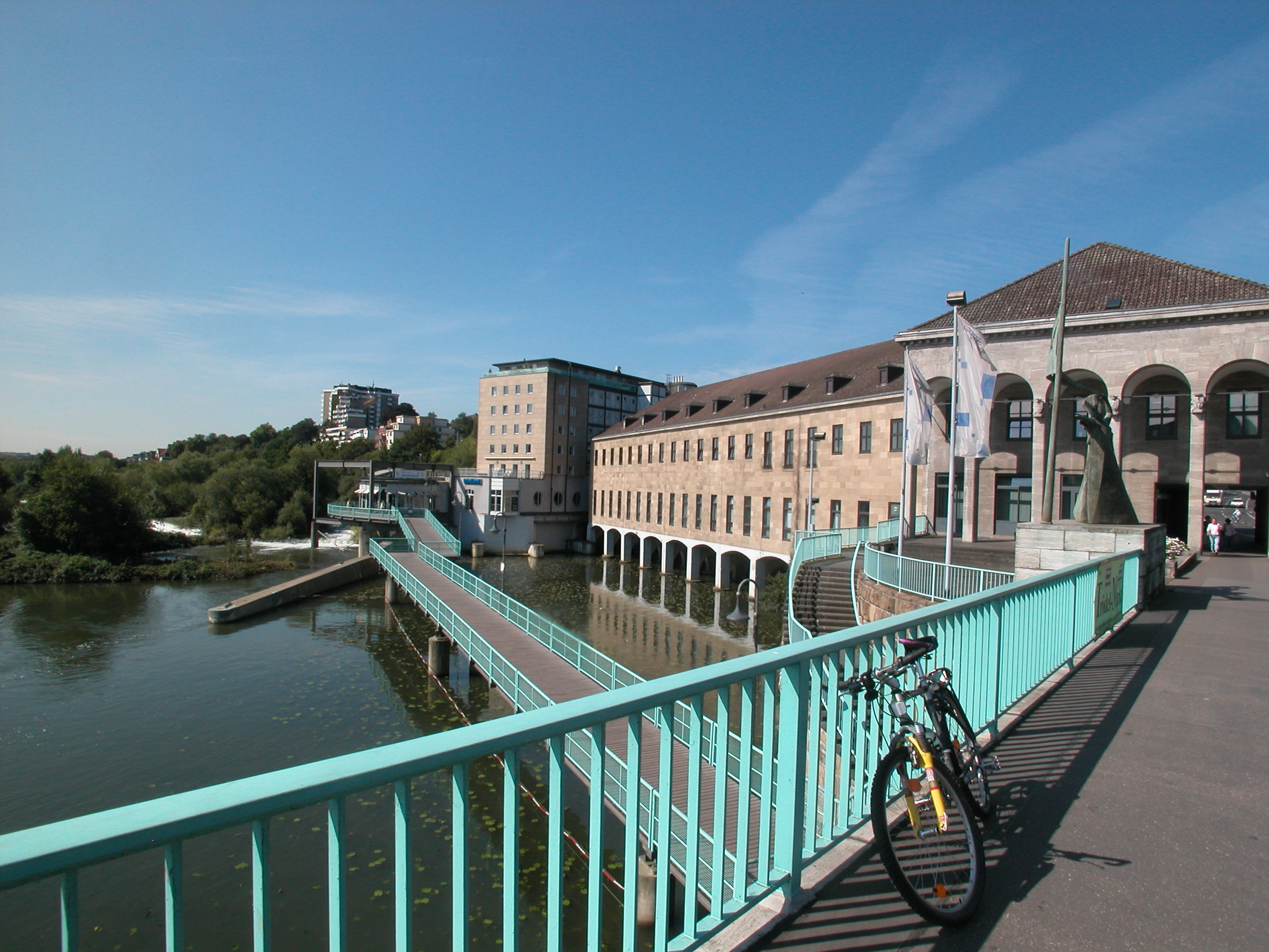 Auf der Schlossbrücke, Blick auf das RWW-Gebäude